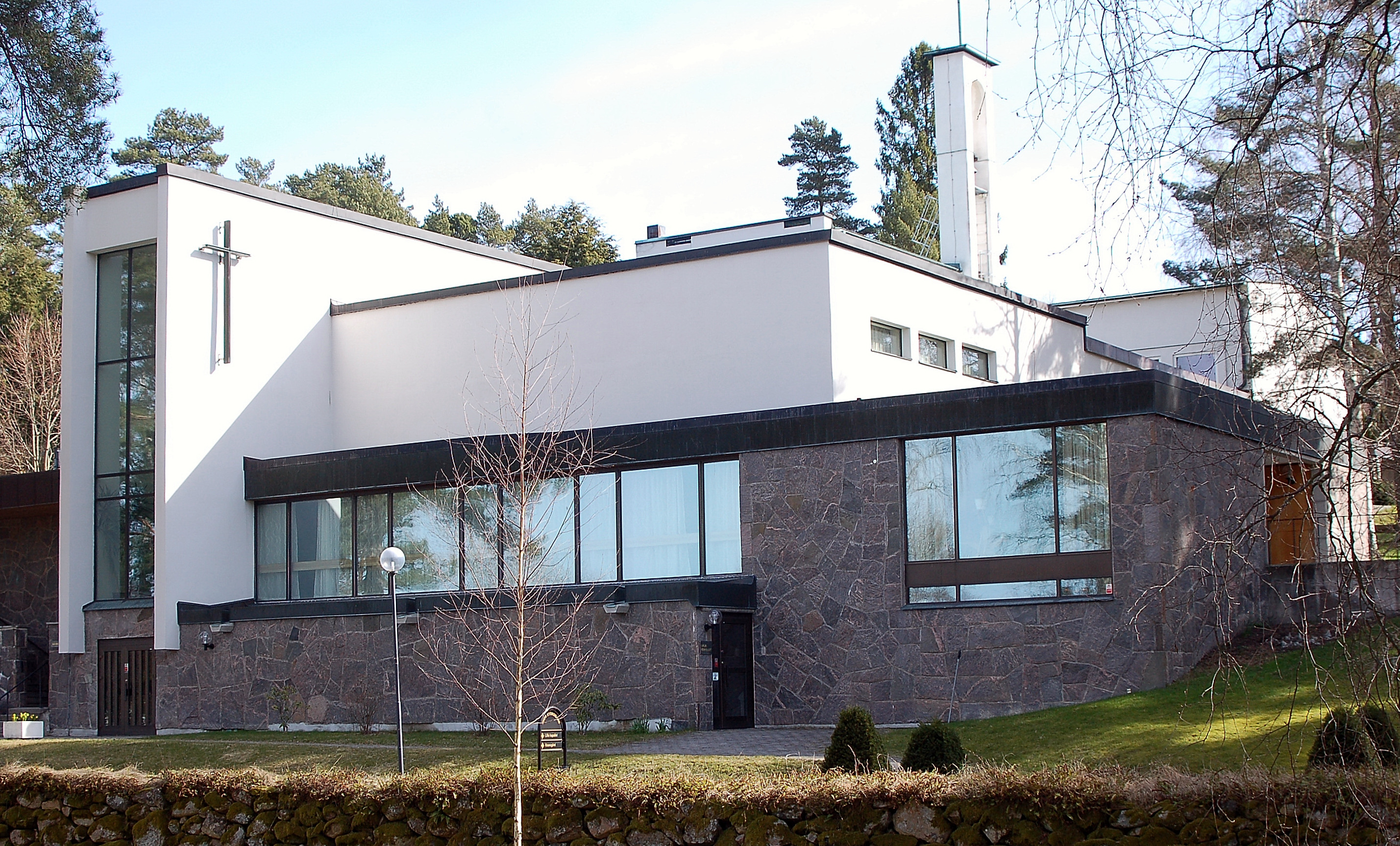 Korsets kapell på Ruds kyrkogård. Byggnadsår 1968. Arkitekt Rudolf Holmgren